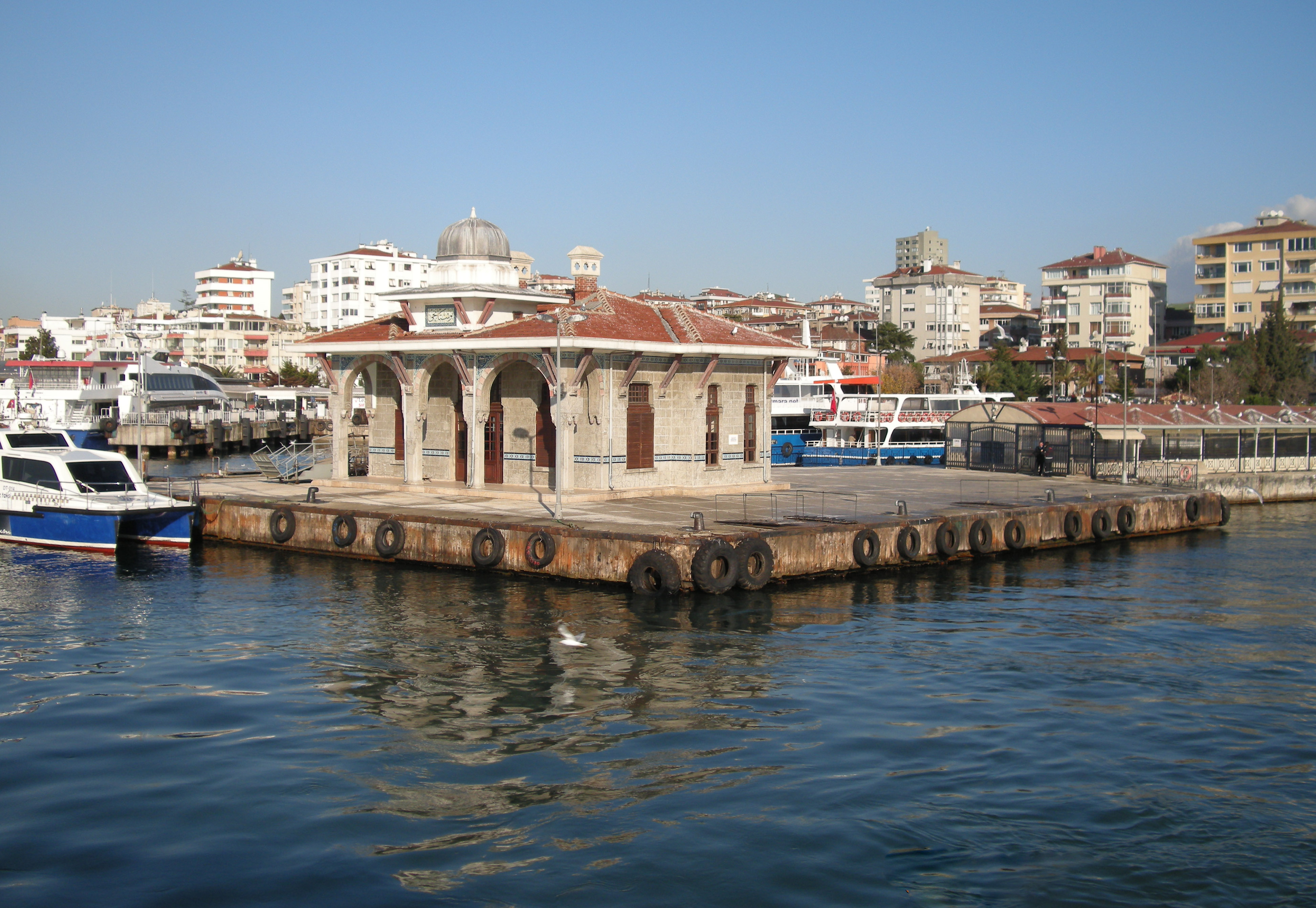 Bostancı, Kadıköy, Türkiye